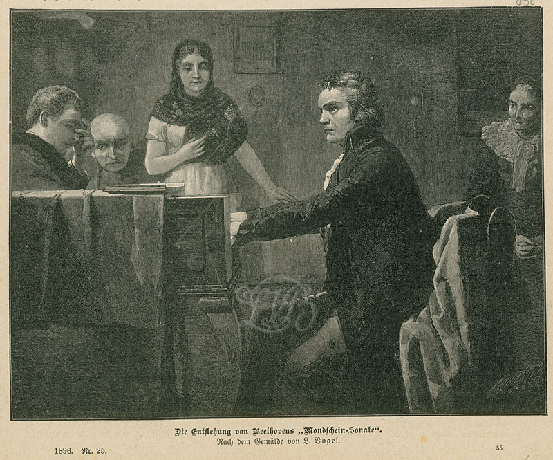 Die Entstehung von Beethovens Mondschein-Sonate, Stich nach einer Vorlage von Lorenz Vogel, aus: „Die Gartenlaube“ Nr. 25, 1896 (Beethoven-Haus Bonn, B 2430)